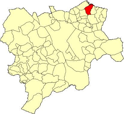 Mapa municipal de Albacete con el municipio de Casas-Ibáñez resaltado en rojo.